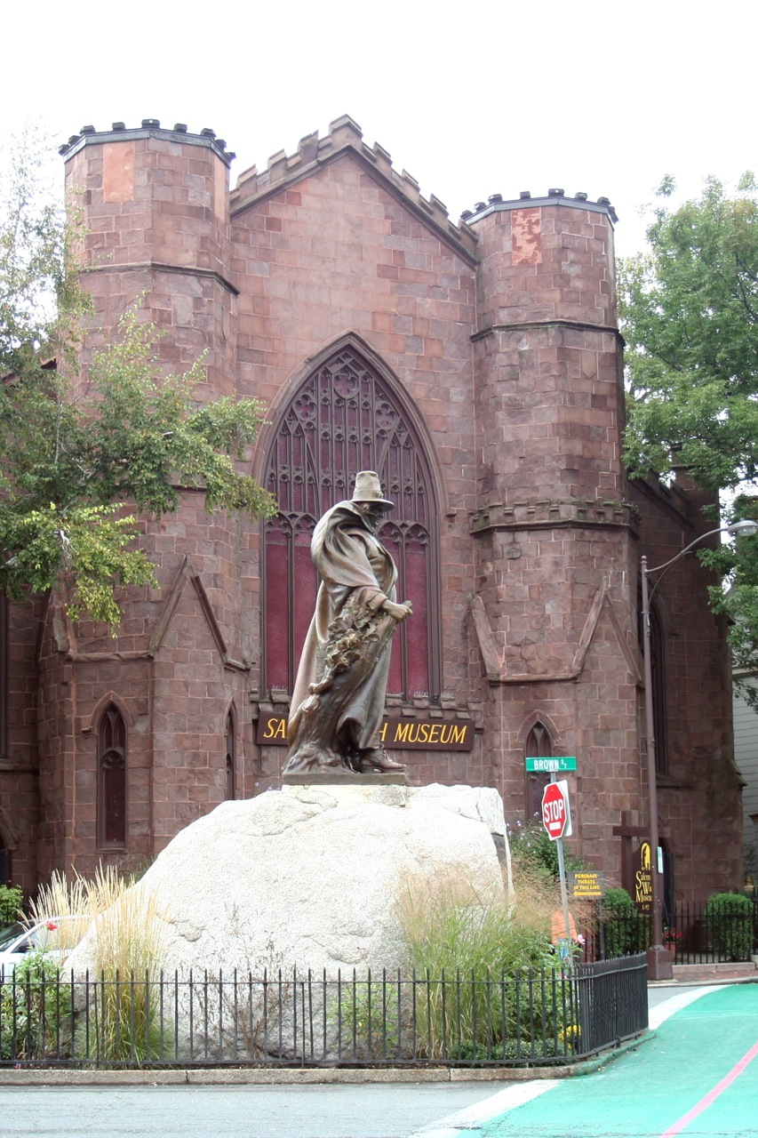 Salem Witch Museum und Denkmal